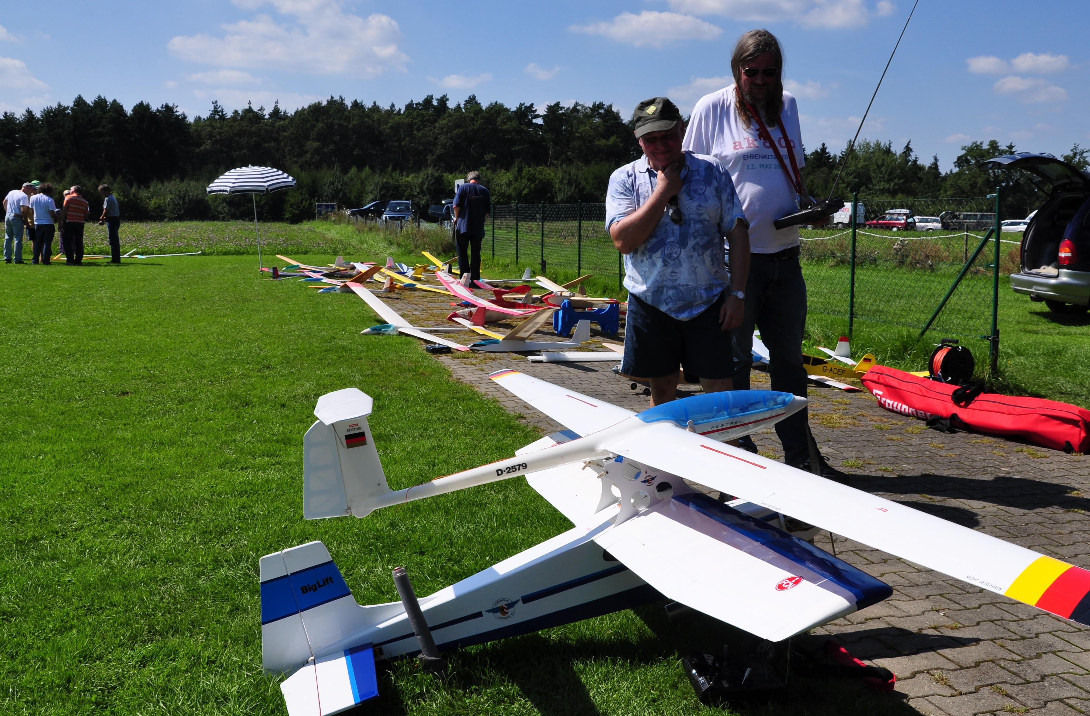 Multiplex BigLift